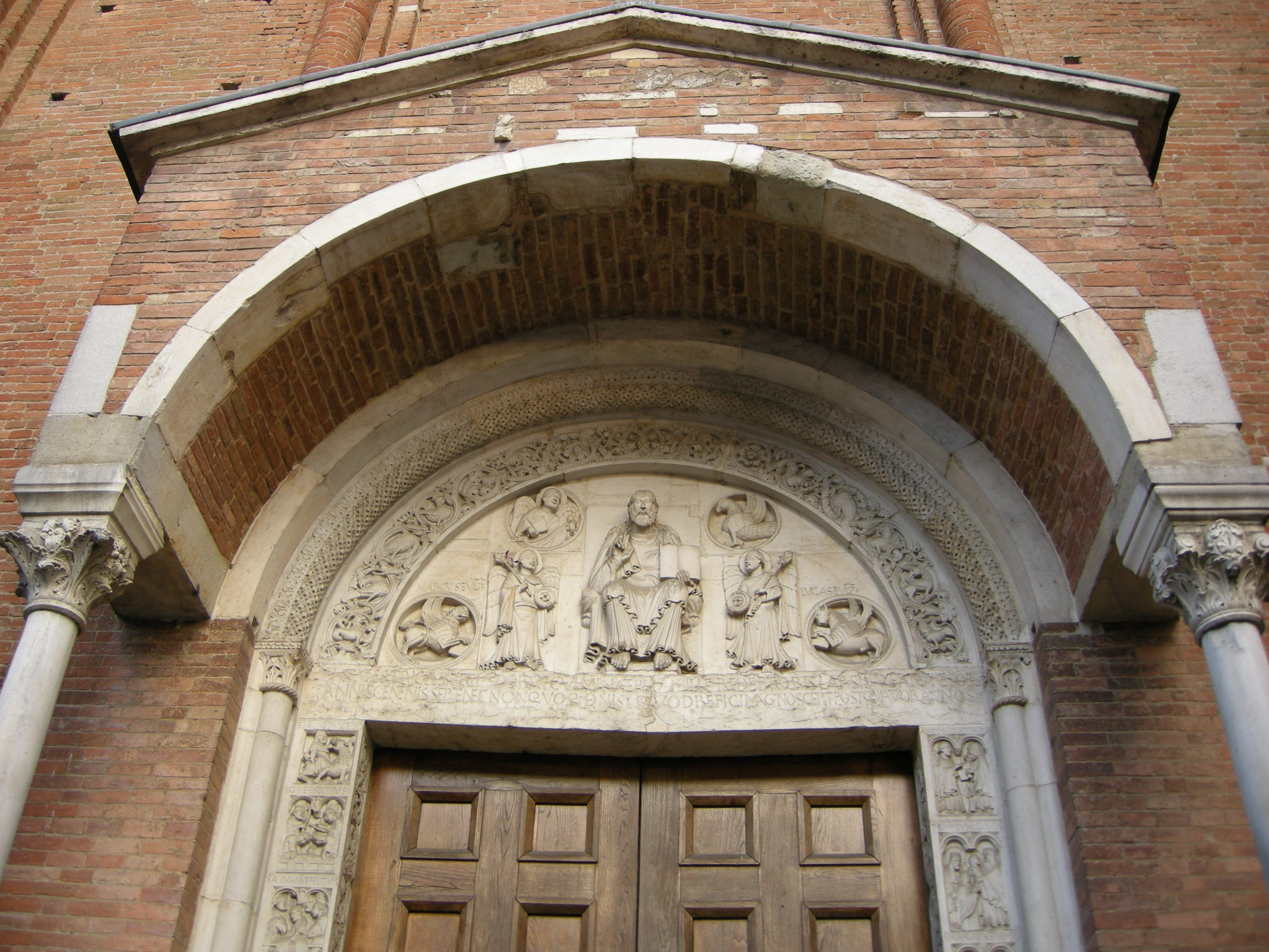 Abbazia di nonantola, portale di seguaci wiligelmo